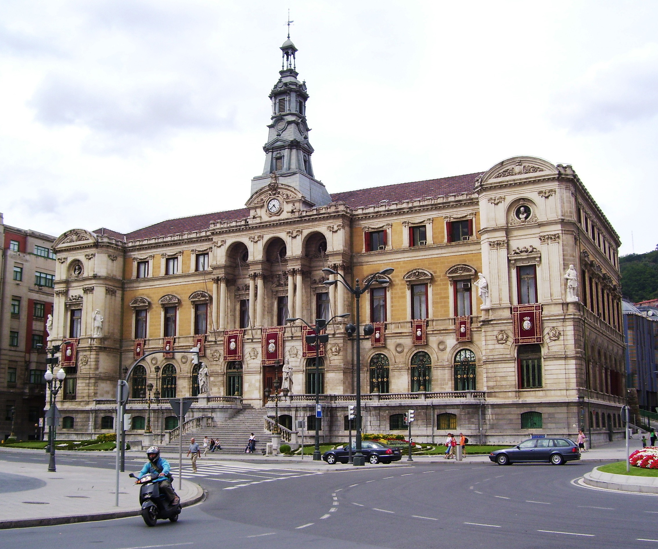 Ayuntamiento de Bilbao - Bilboko Udala. El edificio fue diseñado por el arquitecto Joaquín de Rucoba y fue terminado en 1892. La obra es una combinación de estilos donde predomina el estilo neoclásico, con toques eclécticos y neobarrocos.